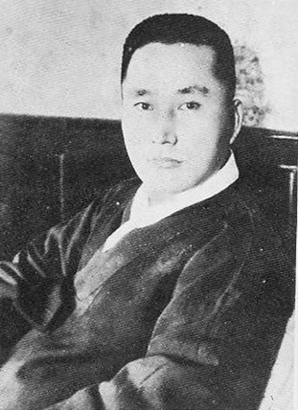 이광수, 동아일보 편집국장 (1925~1926) 시절